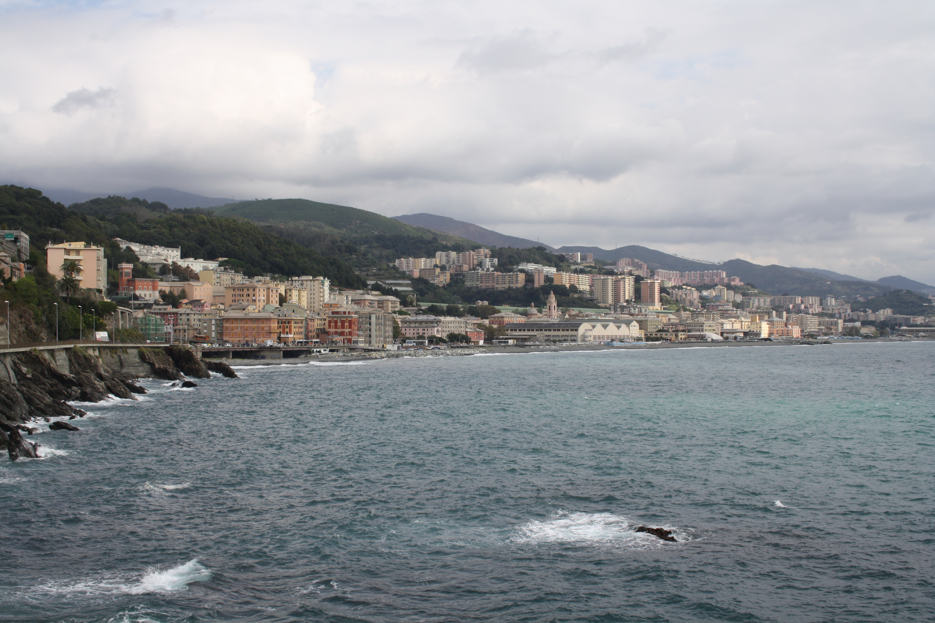 Panorama di Voltri, visto dalle adiacenze del "Mulino di Crevari"